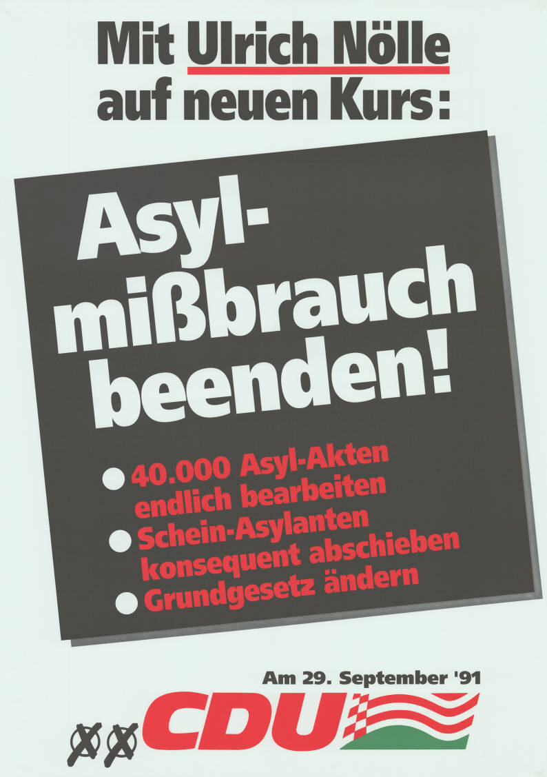 Mit Ulrich Nölle auf neuen Kurs: Asyl- mißbrauch beenden! . 40.000 Asyl-Akten endlich bearbeiten . Schein-Asylanten konsequent abschieben . Grundgesetz ändern Am 29. September '91 XX CDU Abbildung: Stimmkreuze Plakatart: Textplakat Allgemein Objekt-Signatur: 10-005 : 602 Bestand: Plakate zu Bürgerschaftswahlen Bremen (10-005) GliederungBestand10-18: Plakate zu Bürgerschaftswahlen Bremen (10-005) » CDU Lizenz: KAS/ACDP 10-005 : 602 CC-BY-SA 3.0 DE